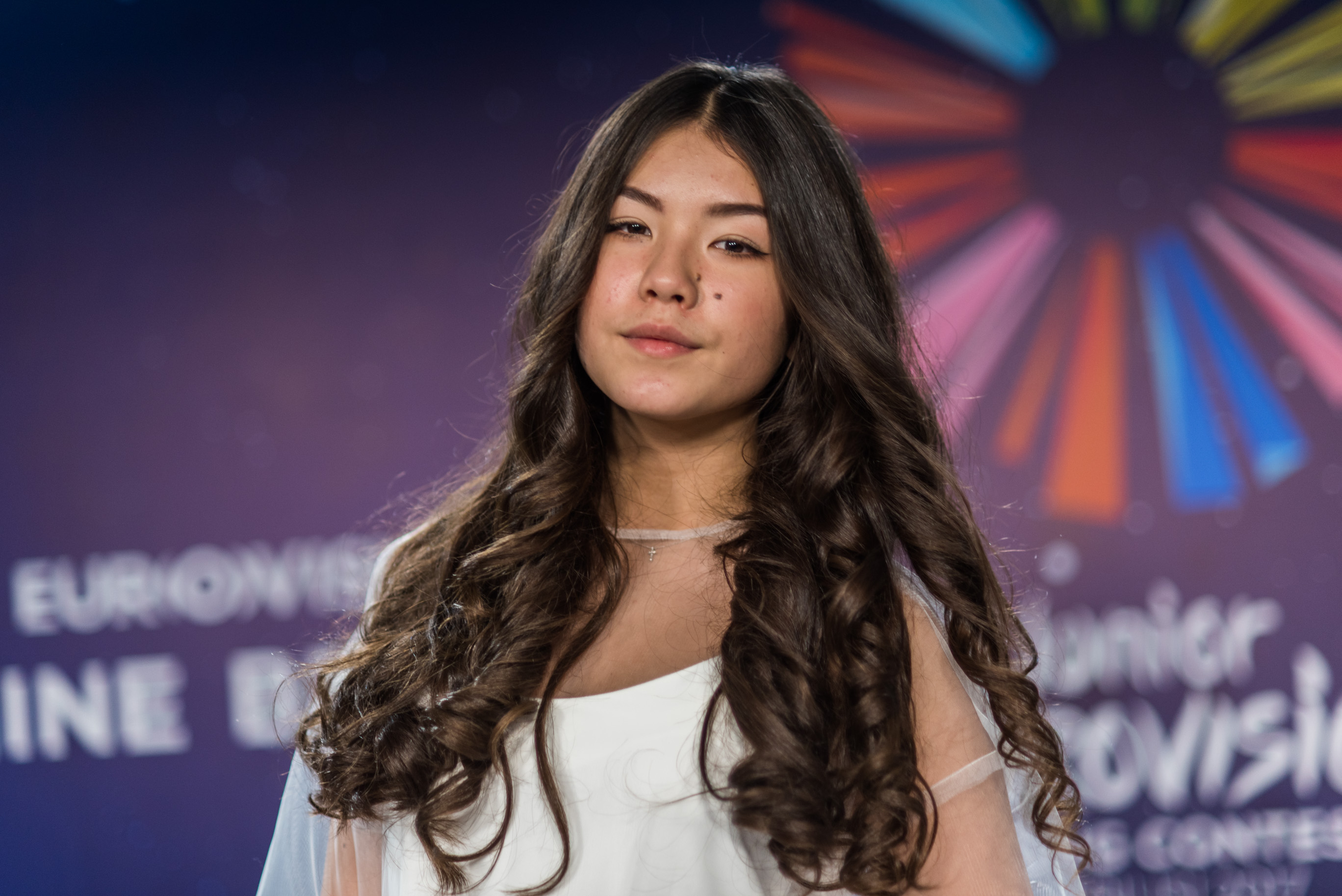 Полина Богусевич на пресс-конференции Детского Евровидения 2017